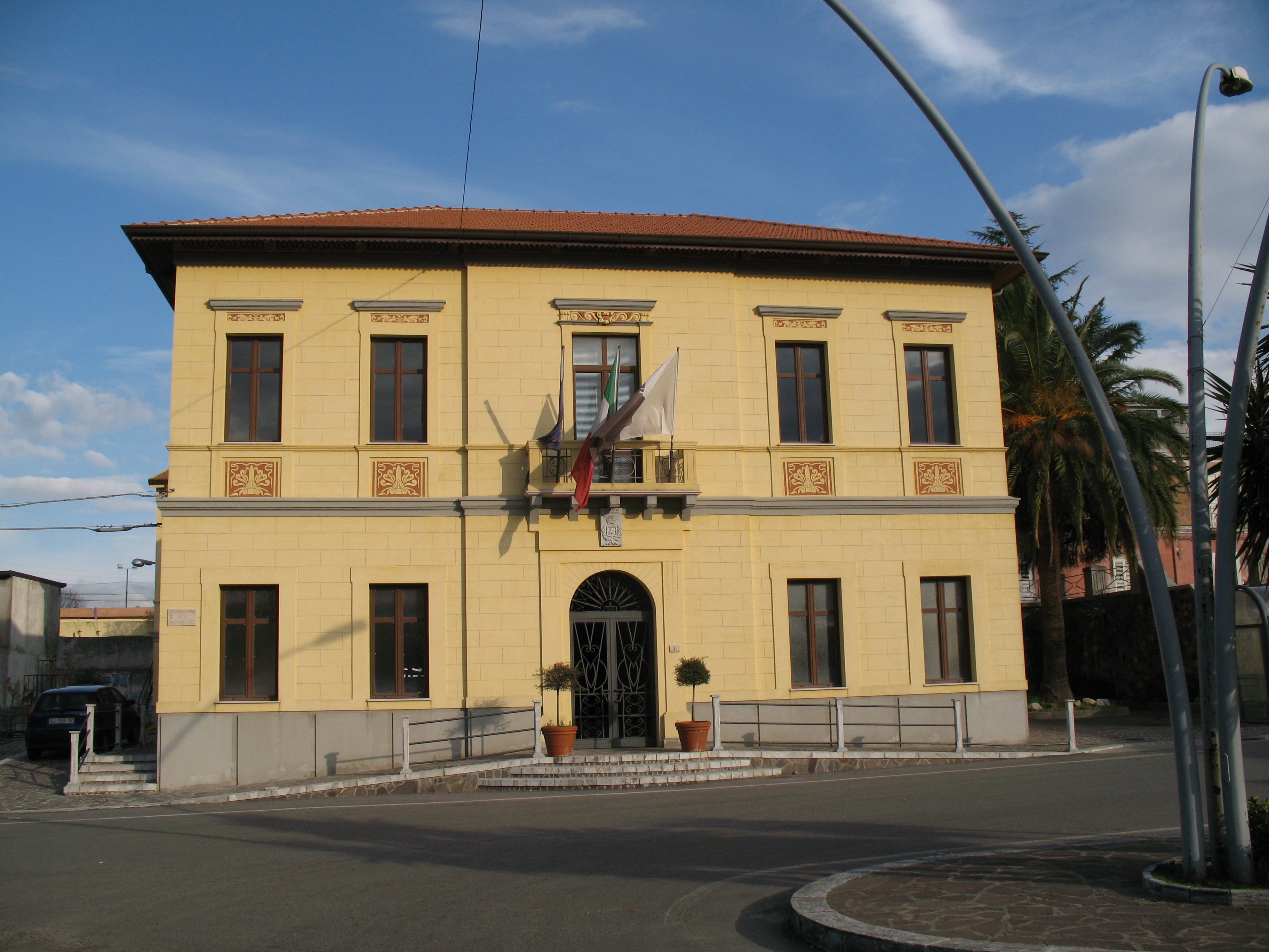 Terranova Sappo Minulio, palazzo municipale